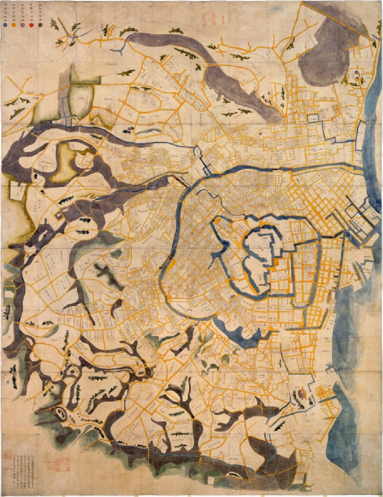 Репродукция карты была сделана в 6-й год Каэй (1853 год), на закате сёгуната Токугава. На карте изображён город Эдо (нынешний Токио) в первый или второй год Сёхо (1644 или 1645 год). Ценность данной карты объясняется тем, что она показывает Эдо до пожара годов Мэйрэки (1657). Холмы и леса окрашены зелёным цветом, рисовые поля — серым, дороги — жёлтым, мосты — красным. Синим выделены водные объекты — море, река или канал. Моста Рёгокубаси на карте нет, поскольку он будет построен позже. Ниси Хонгандзи показан в Хаматё, где он находился до переноса в Цукидзи; Хигаси Хонган-дзи показан вне Судзикай-мон, так как ранее он был перенесён в Асакуса. Сэнсо-дзи находится в восточном углу карты, Дзодзёдзи — в южном; место будущей постройки Гококу-дзи обозначено как парк.